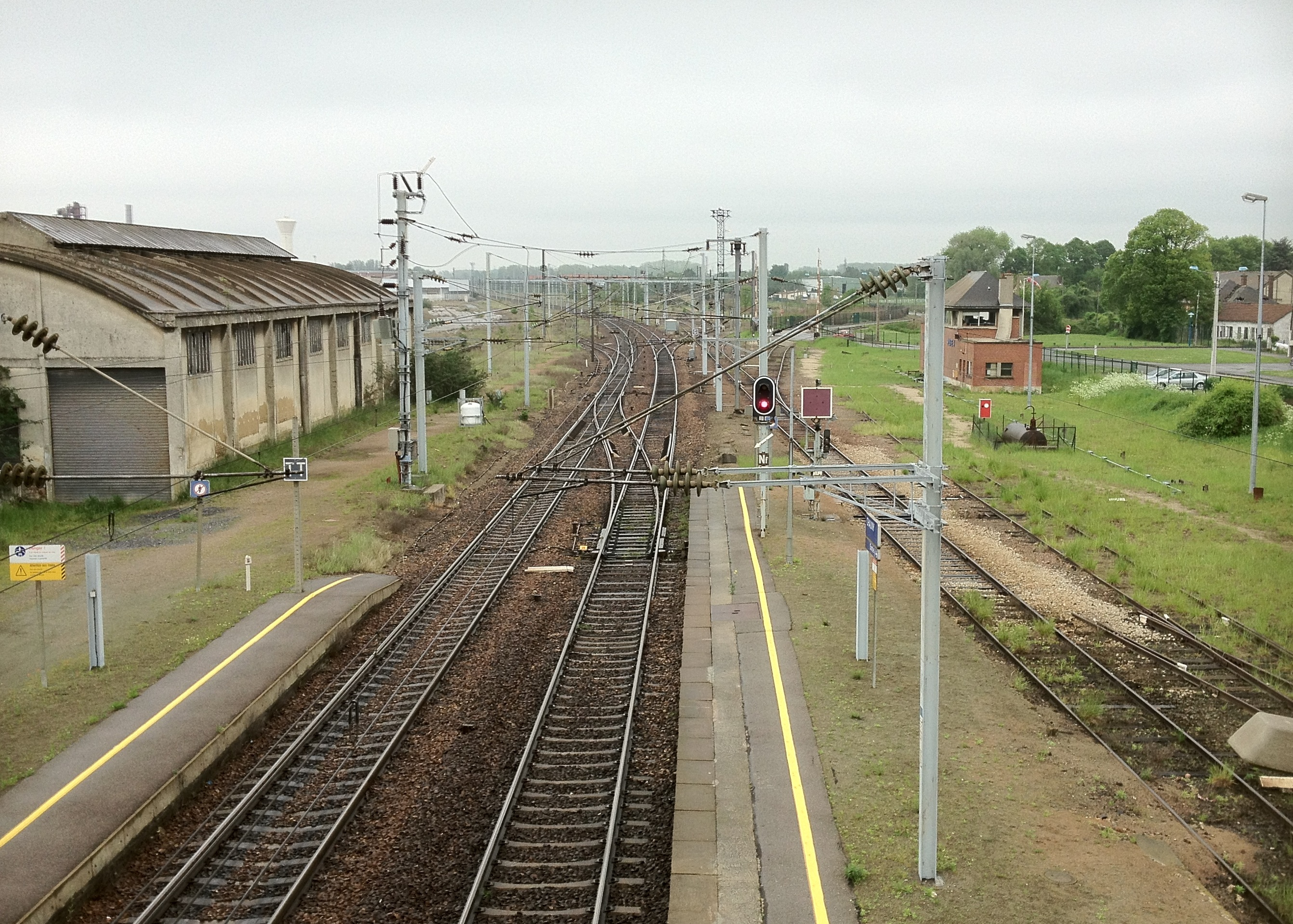 Photographie des voies de la gare de Chauny le 28 mai 2011 au lever du soleil.